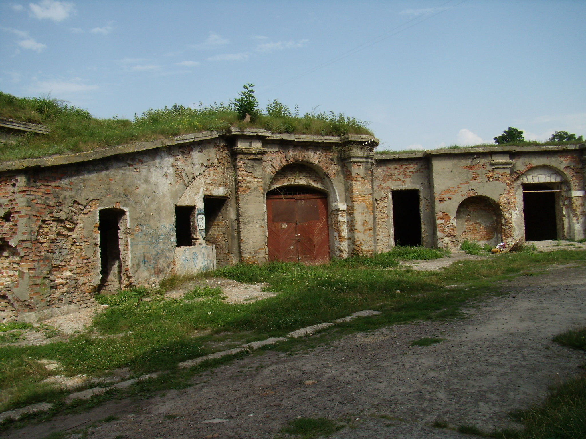 Вали і бастіони з казематами (мур.), Броди, вул. Шкільна, 13